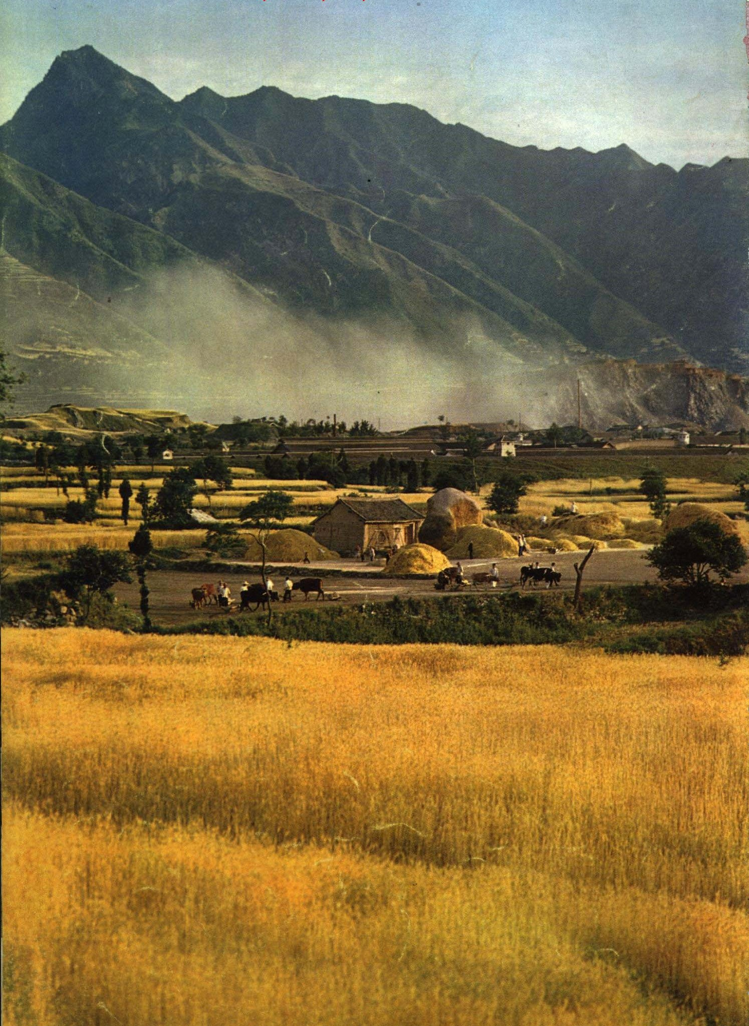 1965-8 1965 渭河平原麦田